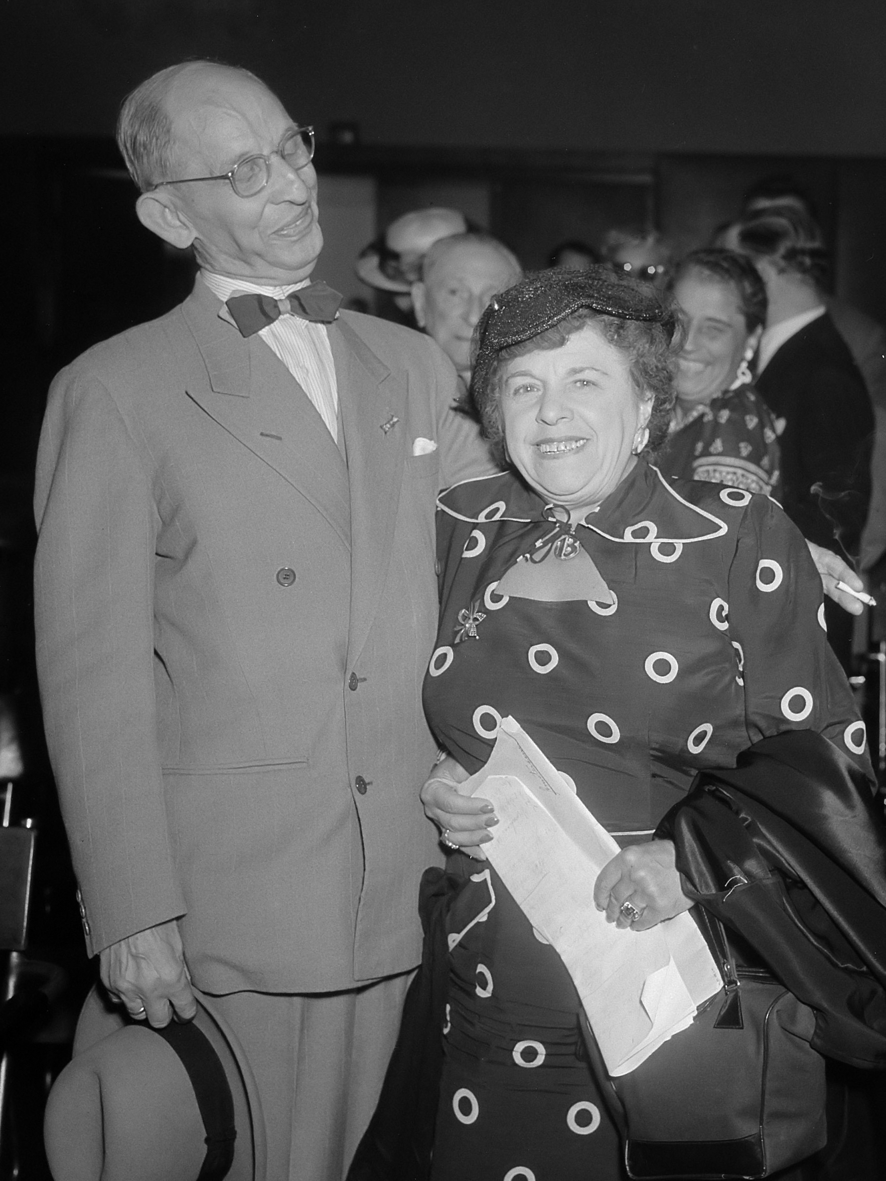 AVRO-opname "Toen Flora floreerde" . Henriette Davids Buziau 8 augustus 1952